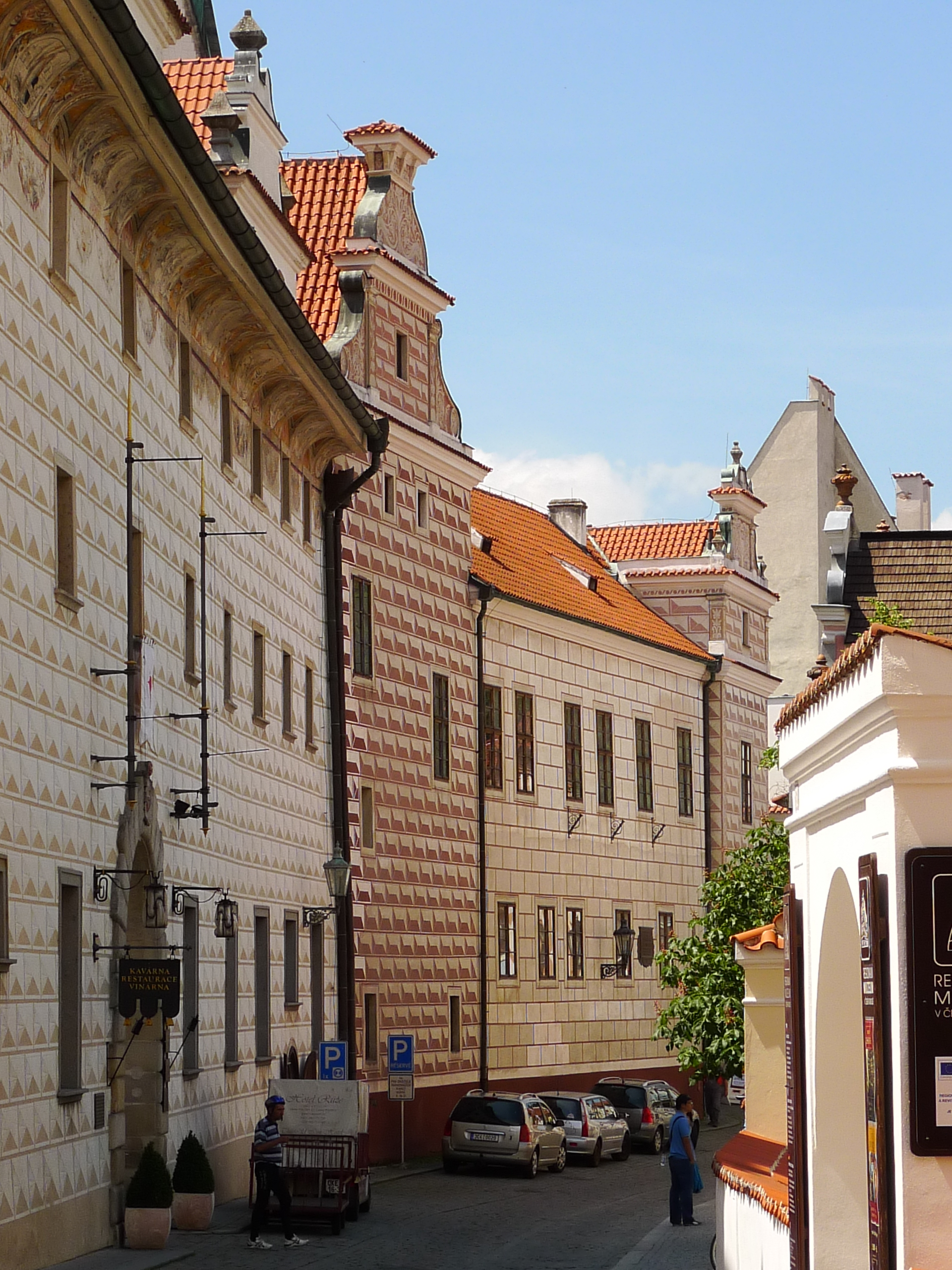 Klášter - prelatura (býv.) (Český Krumlov), Horní 155, Český Krumlov